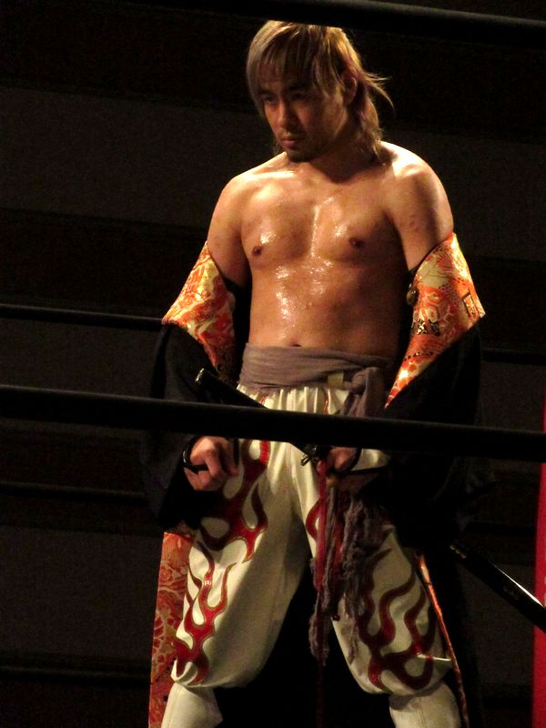 2016.05.28横浜